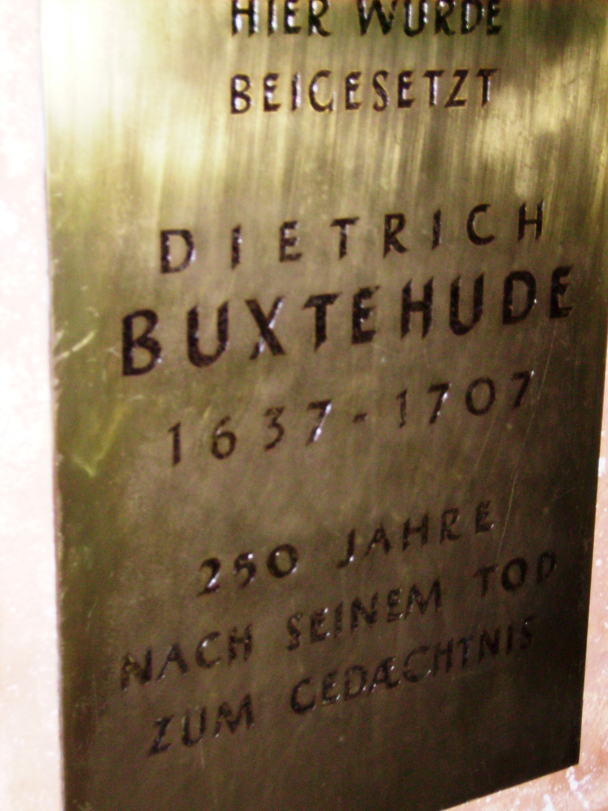 Gedenktafel für Dietrich Buxtehude in St. Marien